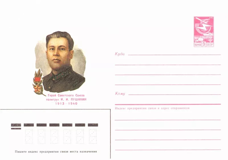 Конверт с маркой СССР. Герой Советского Союза политрук И. И. Пушанин. 1913-1940